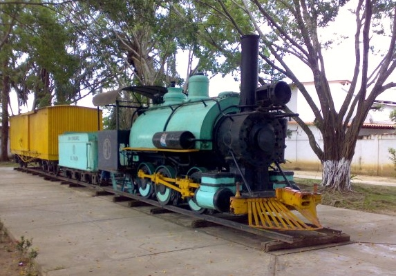 Gran Ferrocarril del Tachira, Catatumbo